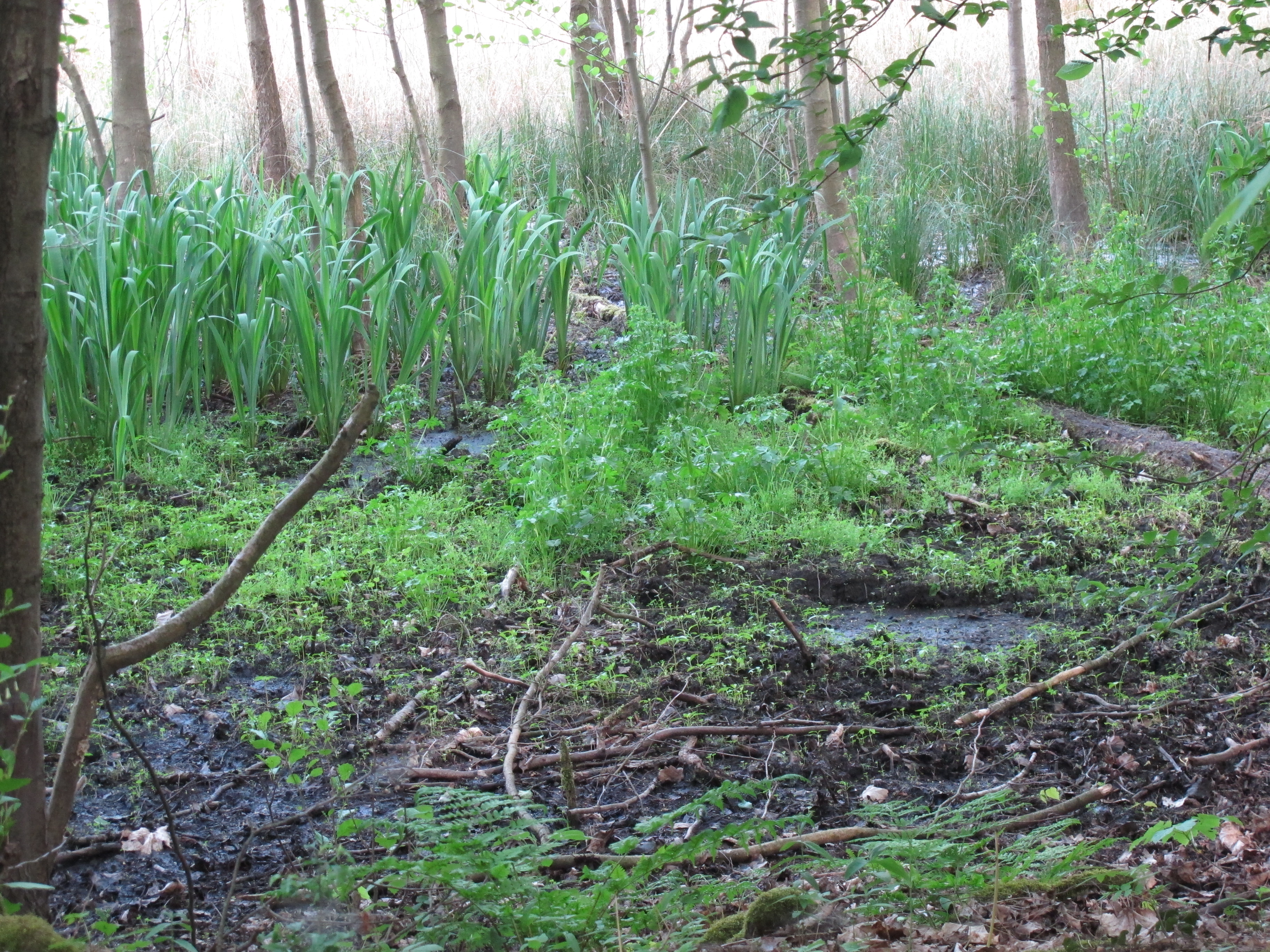 Der See hatte früher eine Bootsanlegestelle und war ein beliebtes Ausflugsziel. Durch die Veränderung des Untergrundes ist der See in den 1970er Jahren bis auf eine heute erkennbare kleine morastige Fläche ausgetrocknet. Die ehemalige "Badewanne", die Bodenverdichtung, entstand im Laufe vieler Jahrhunderte durch die Verflechtung abgestorbener Pflanzenteile. Im Laufe des letzten 40 Jahre sank der Grundwasserstand um 5 Meter. Inwieweit dies zum Versickern des Sees beigetragen hat ist nicht endgültig untersucht.